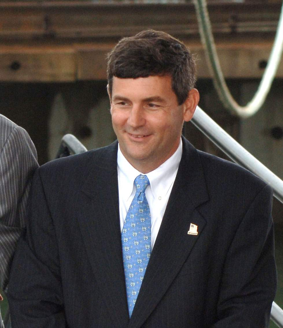 Майкл Петтерс, президент судостроительной компании Northrop Grumman Shipbuilding (2006-10-07), ныне президент и CEO компании Huntington Ingalls Industries.